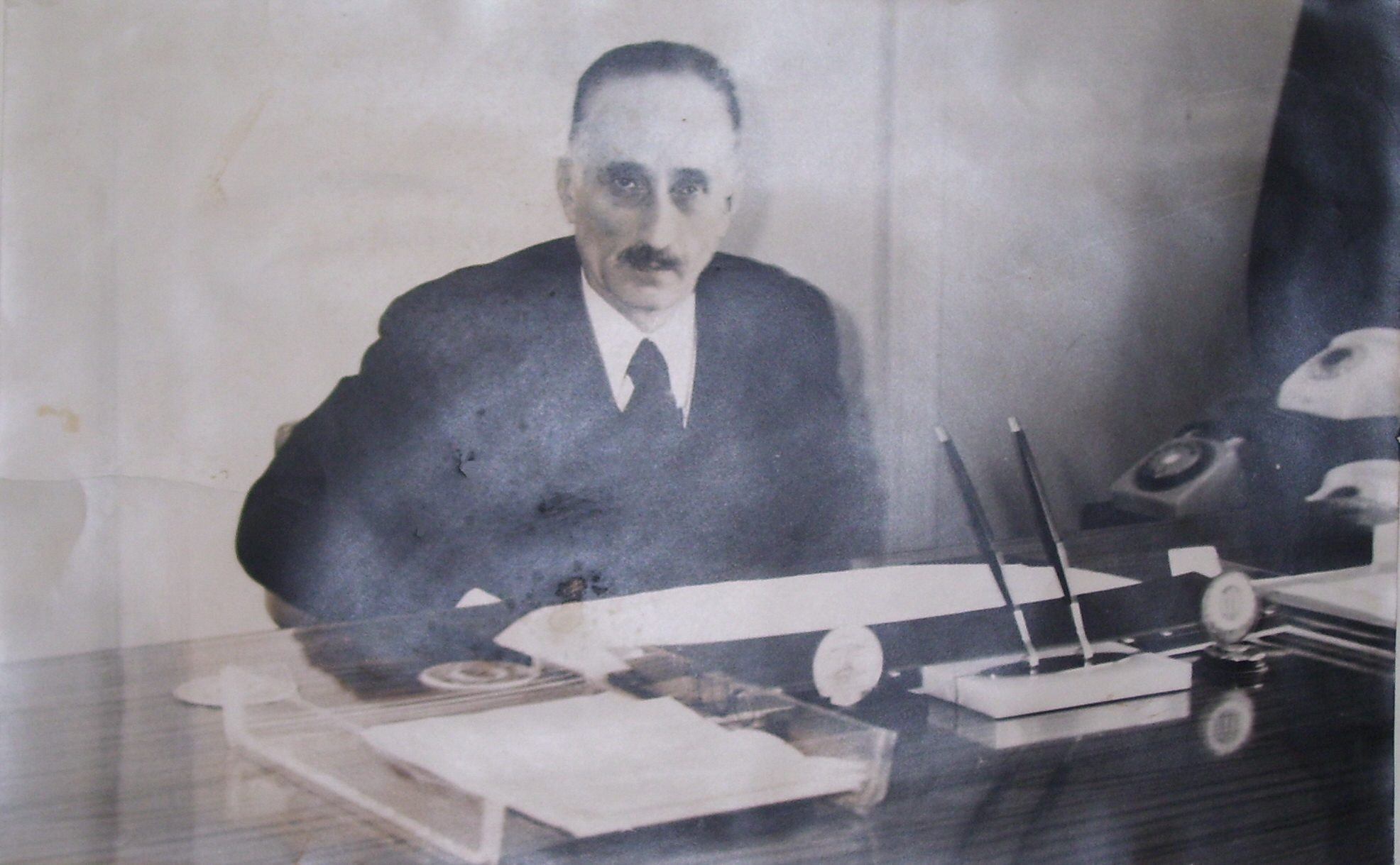 صالح اليوسفي وهو جالس في مكتبه اثناء توليه أحد الحقائب الوزارية